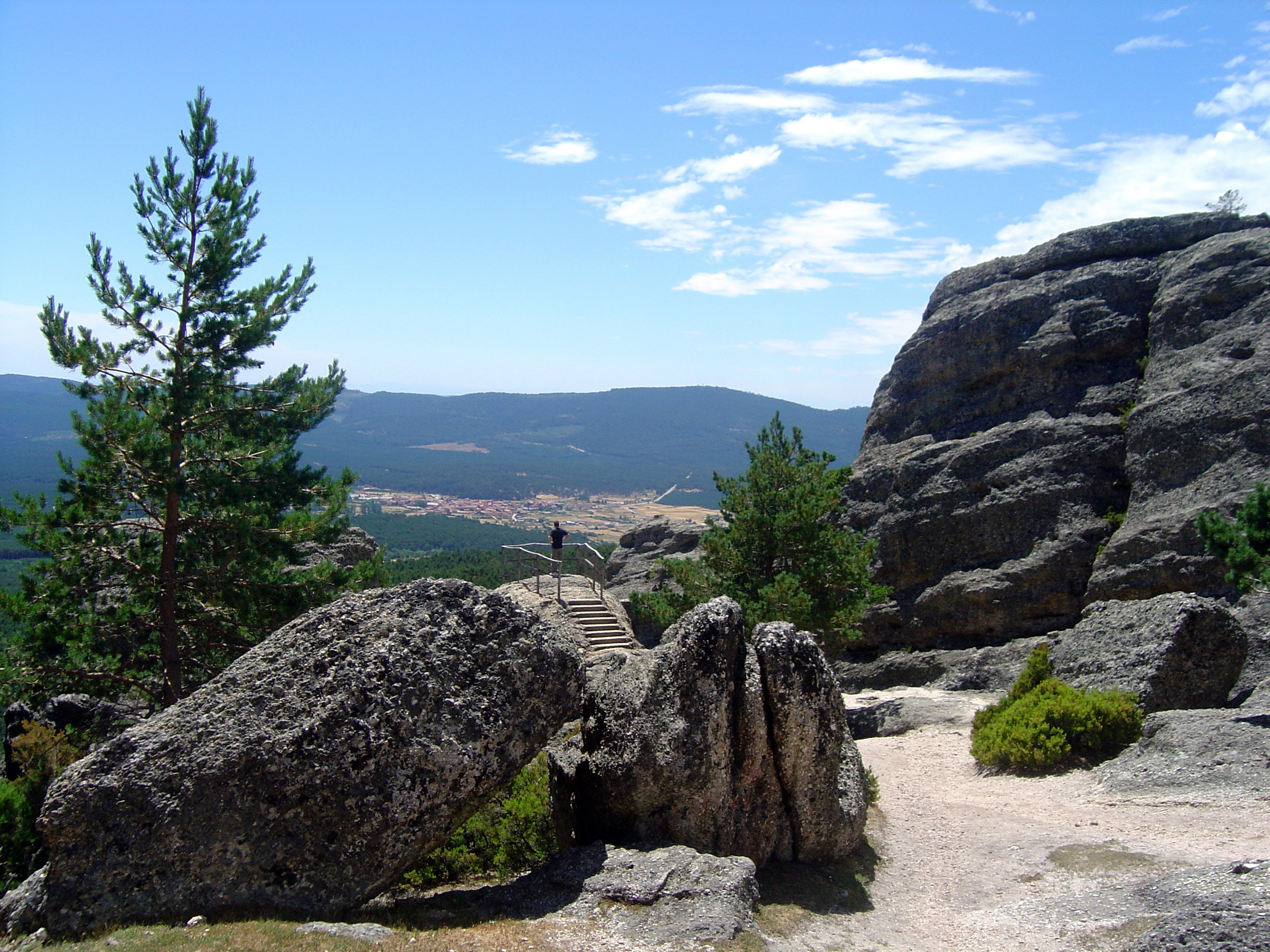 MIRADOR DE CASTROVIEJO 7